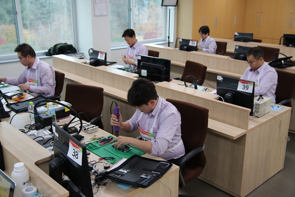 지난 17일 경기도 평택 소재 LG전자 러닝센터에서 열린 ‘2017 서비스 기술올림픽'에 참가한 LG전자 서비스 엔지니어들이 수리 실력을 겨루고 있다.